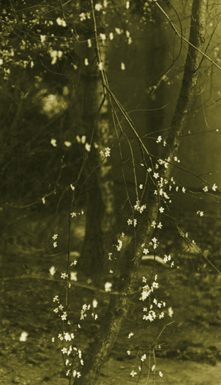 Gelatine silver print. Bromolejová fotografie.